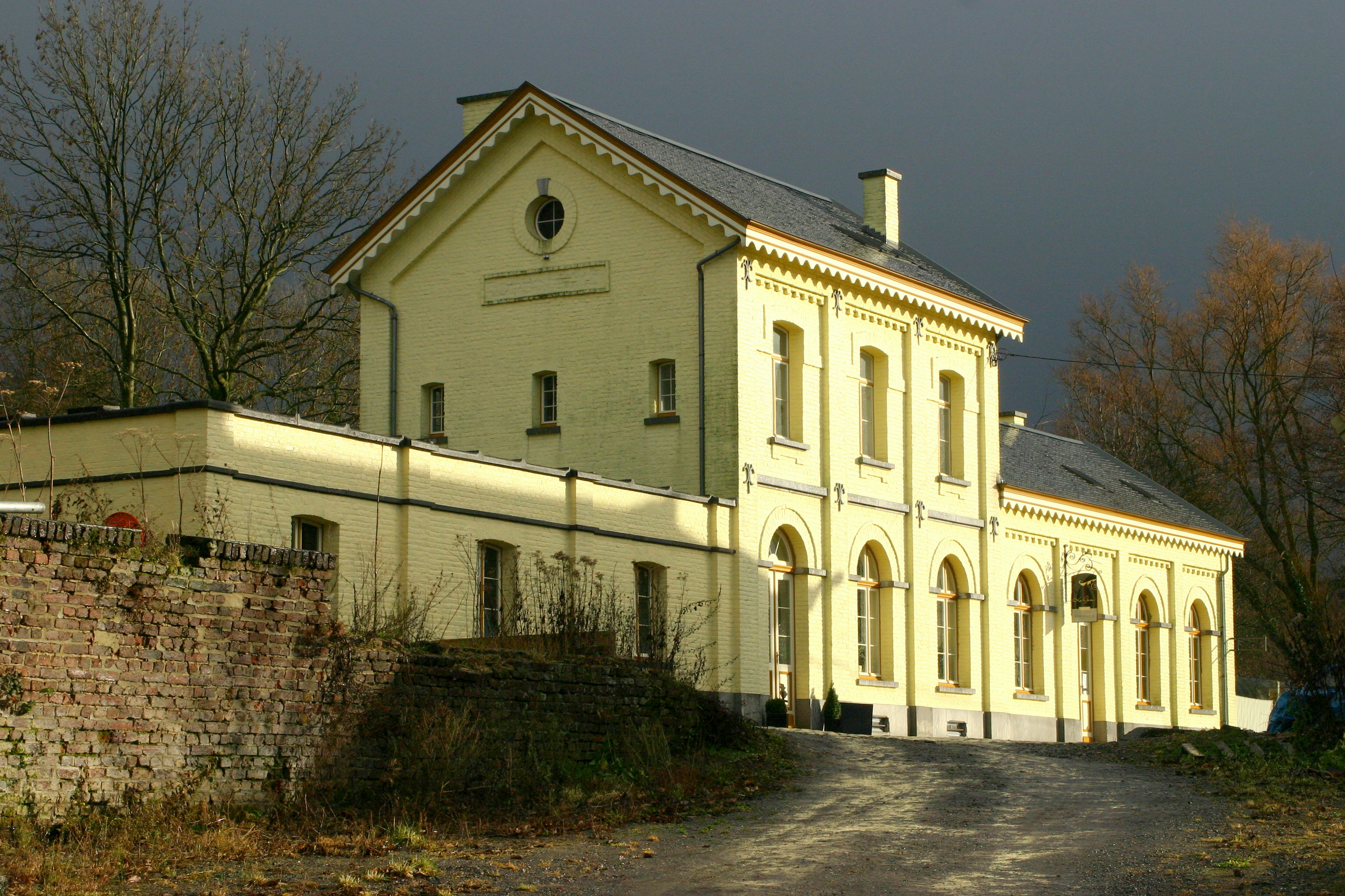 D'Gare vun Hombourg